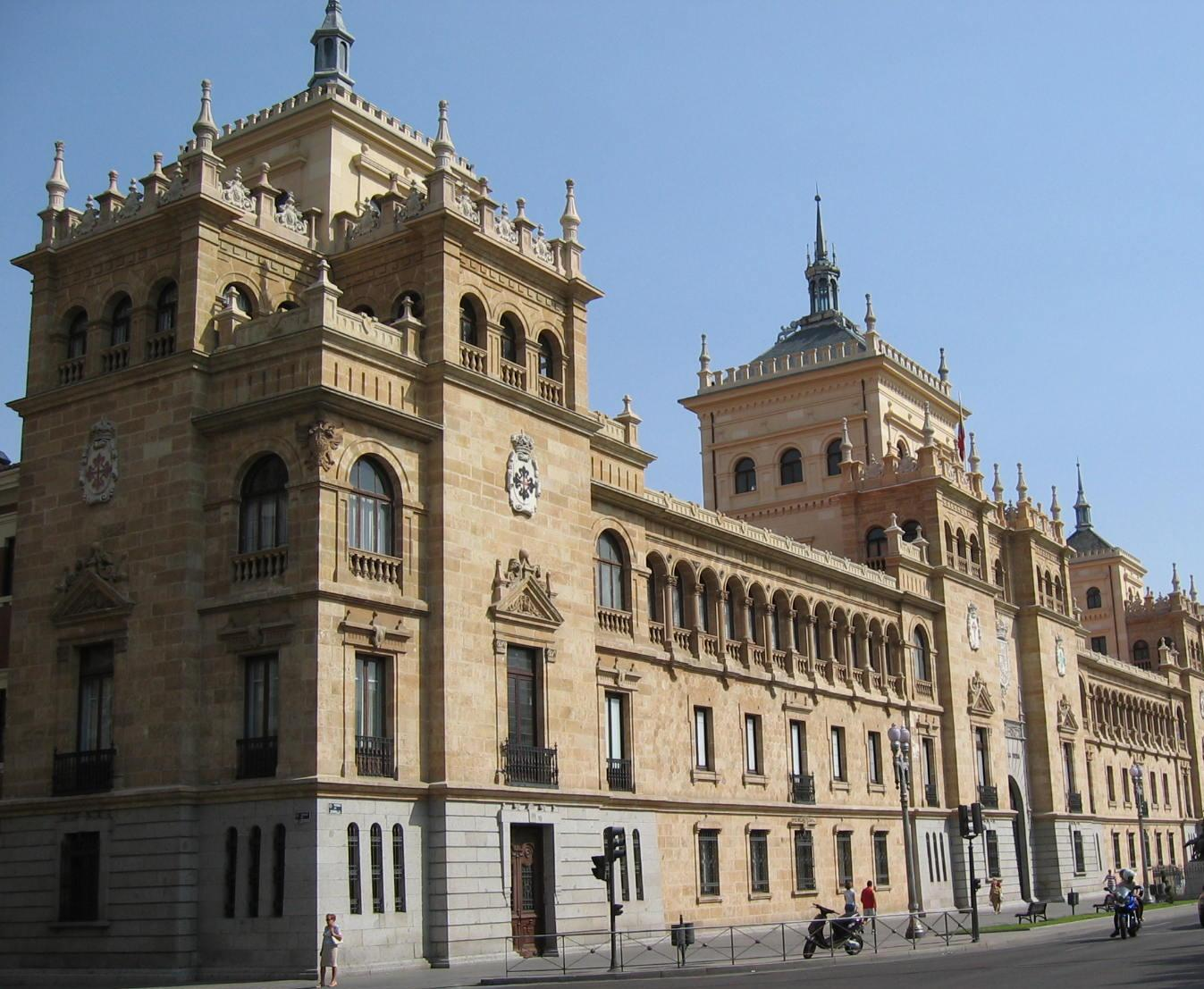 Valladolid (Spain) - Academia de Caballería: La Academia de Caballería se instaló en 1852 en el antiguo edificio que fue destruido en 1915 por un incendio. Se inició la construcción del edificio actual en 1921, de acuerdo con el proyecto del comandante de ingenieros D. Adolfo Piedad Pérez.